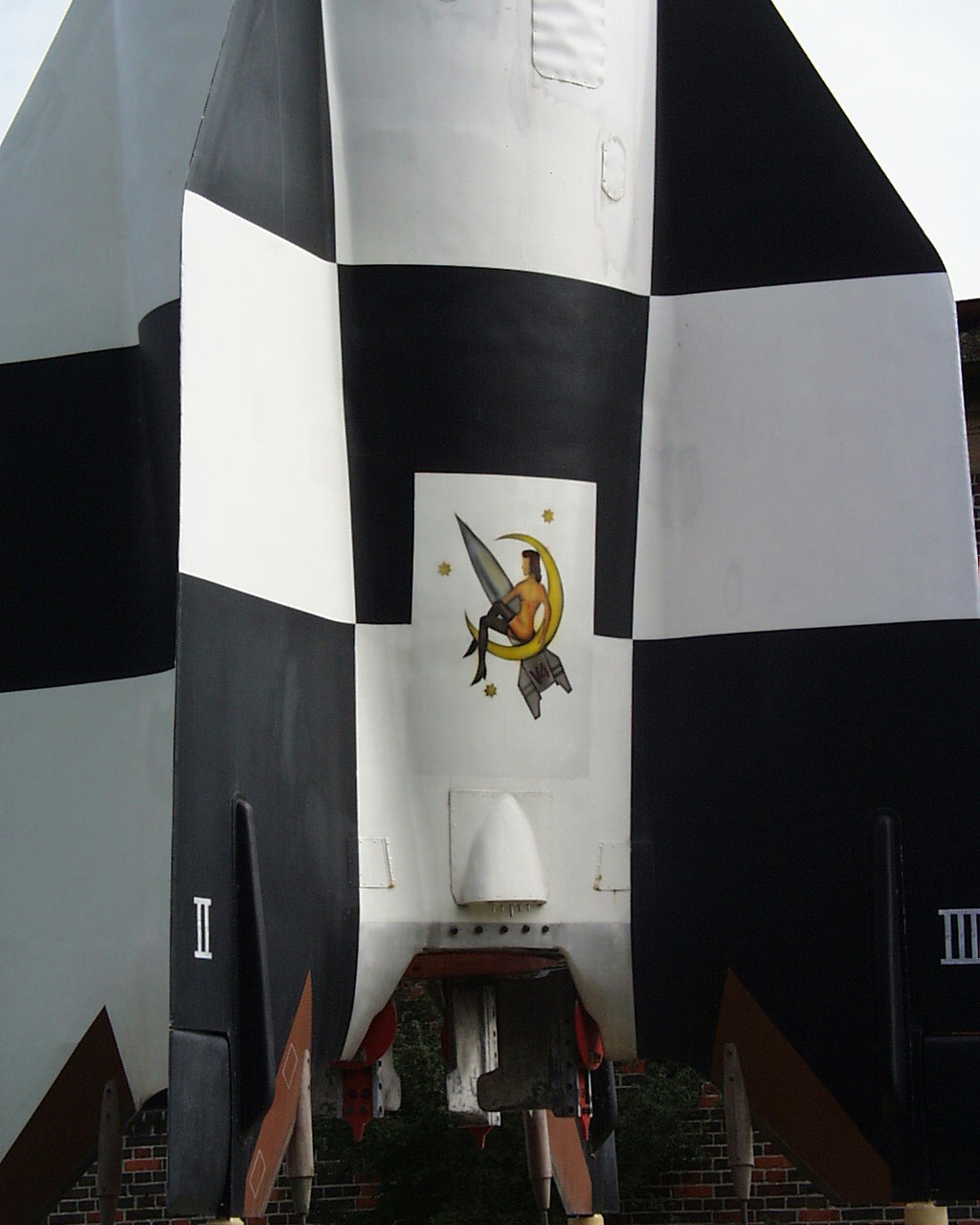 Die Frau im Mond an der V2